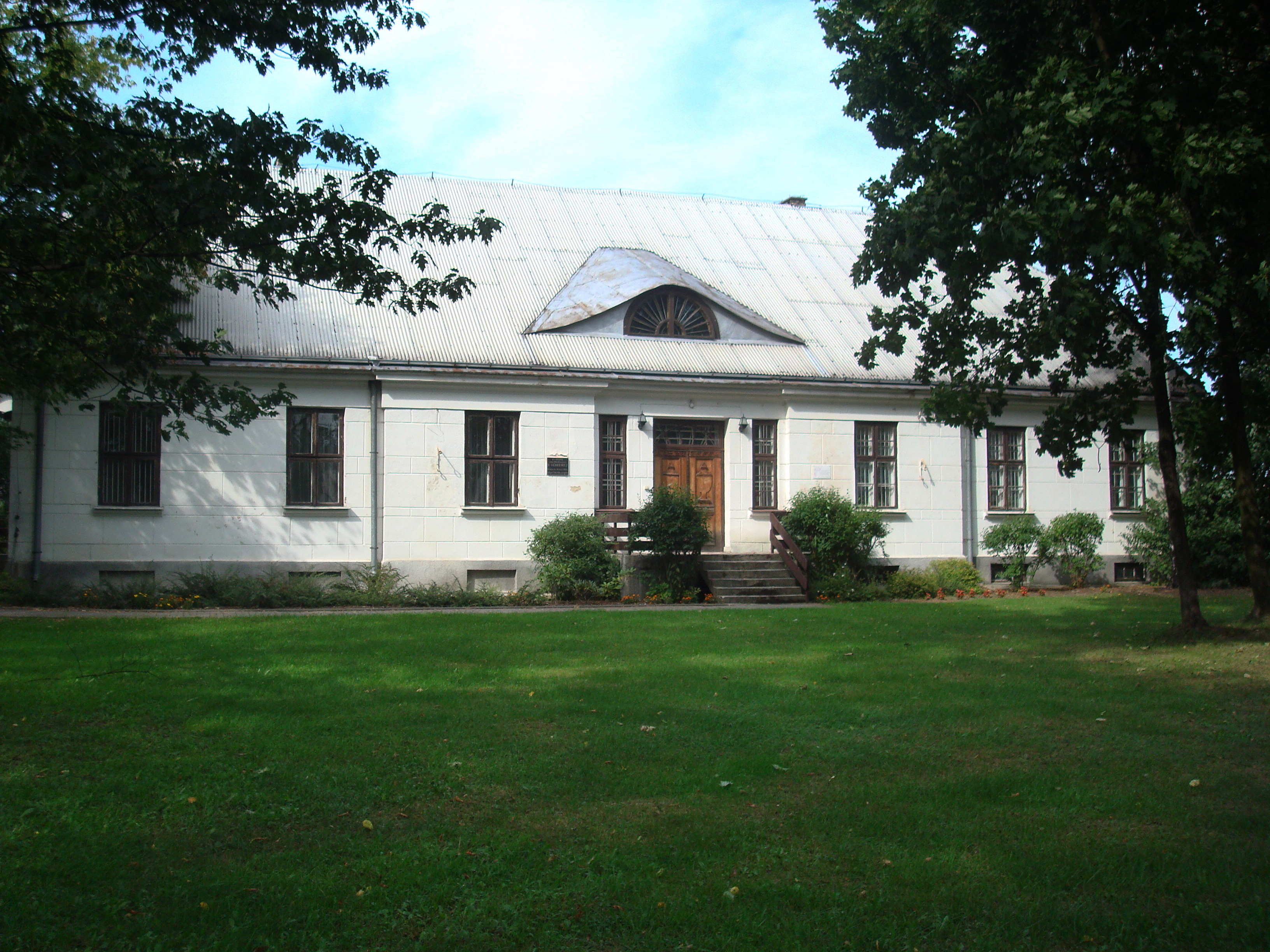 Płońsk Poświętne, ul. Sienkiewicza 11 - zespół dworski, poł. XIX w. (zabytek nr A-212)